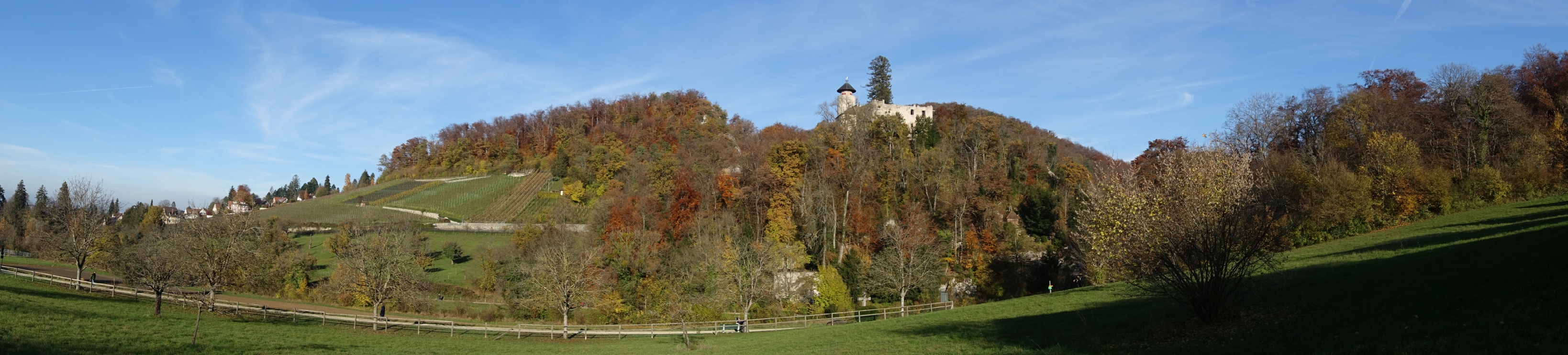 Panorama, Burg Birseck, Arlesheim